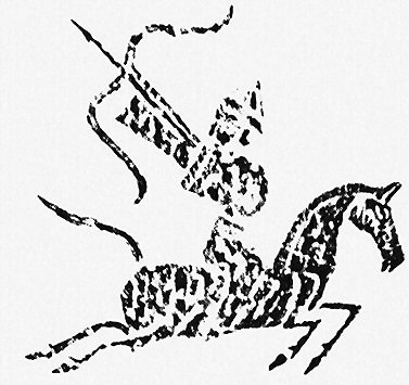 后羿射日